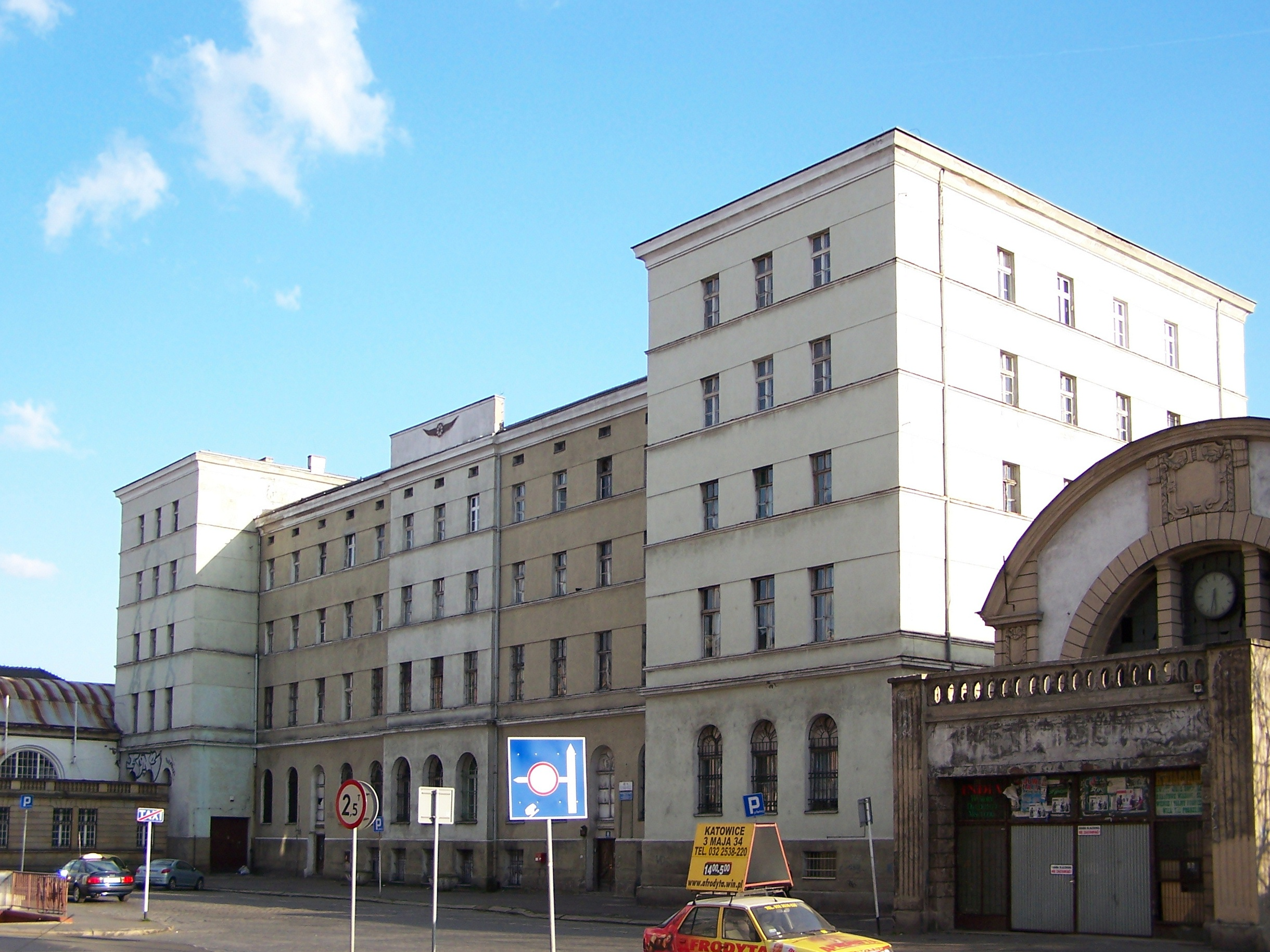 Budynek biurowy w ramach zabudowań starego dworca kolejowego w Katowicach.